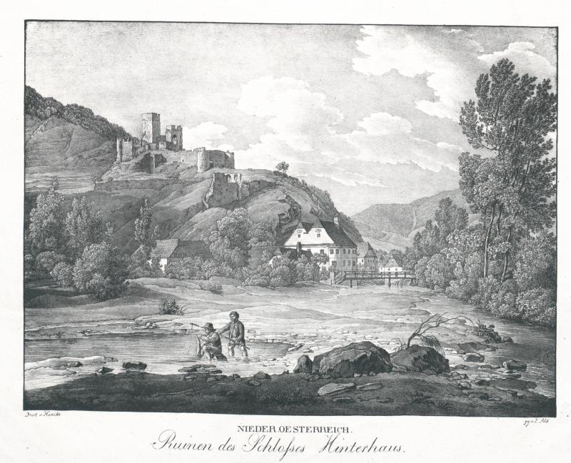 Ruinen des Schlosses Hinterhaus. Niederoesterreich